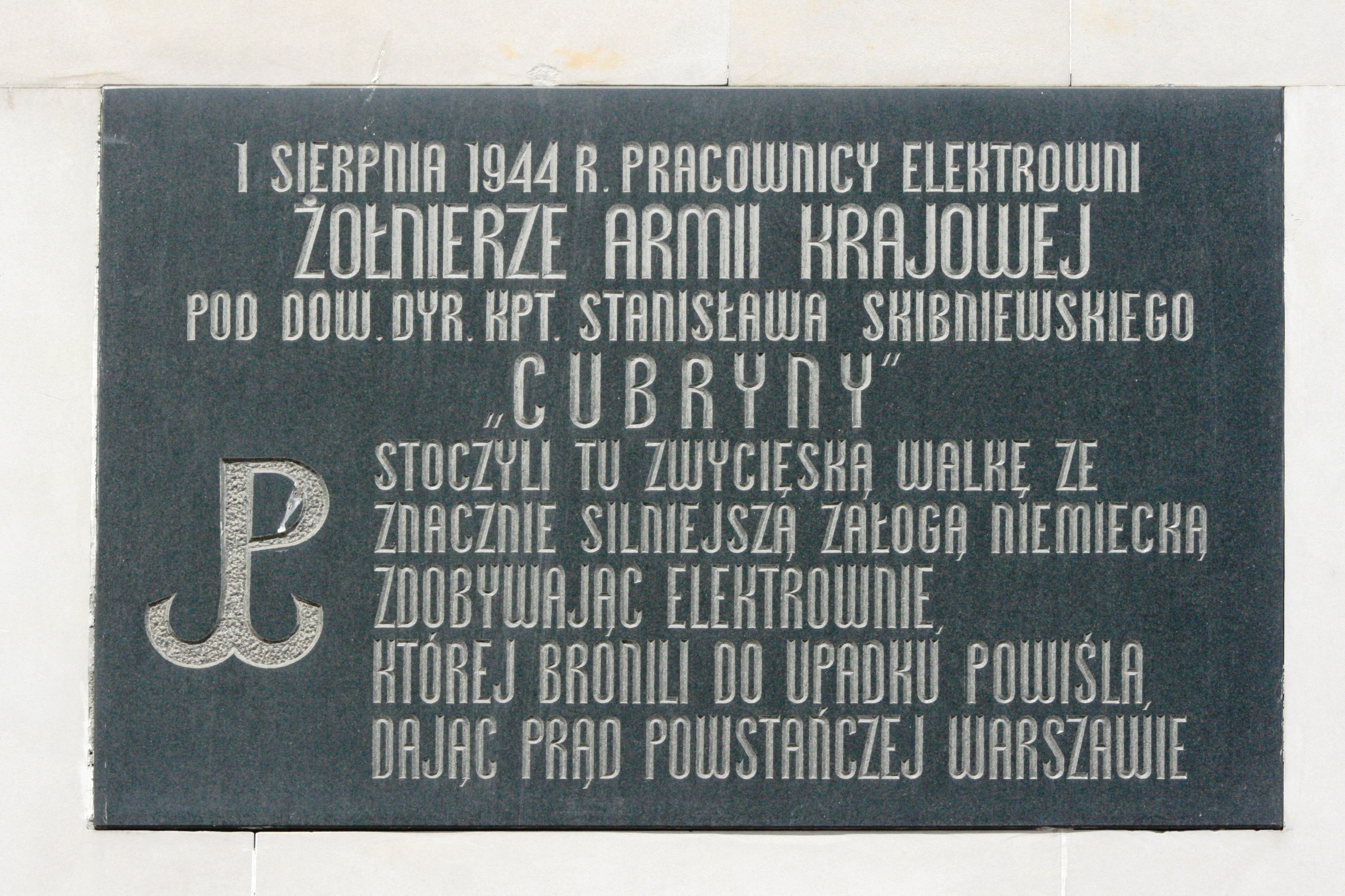 Tablica upamiętniająca walki pracowników elektrowni Powiśle w czasie powstania warszawskiego